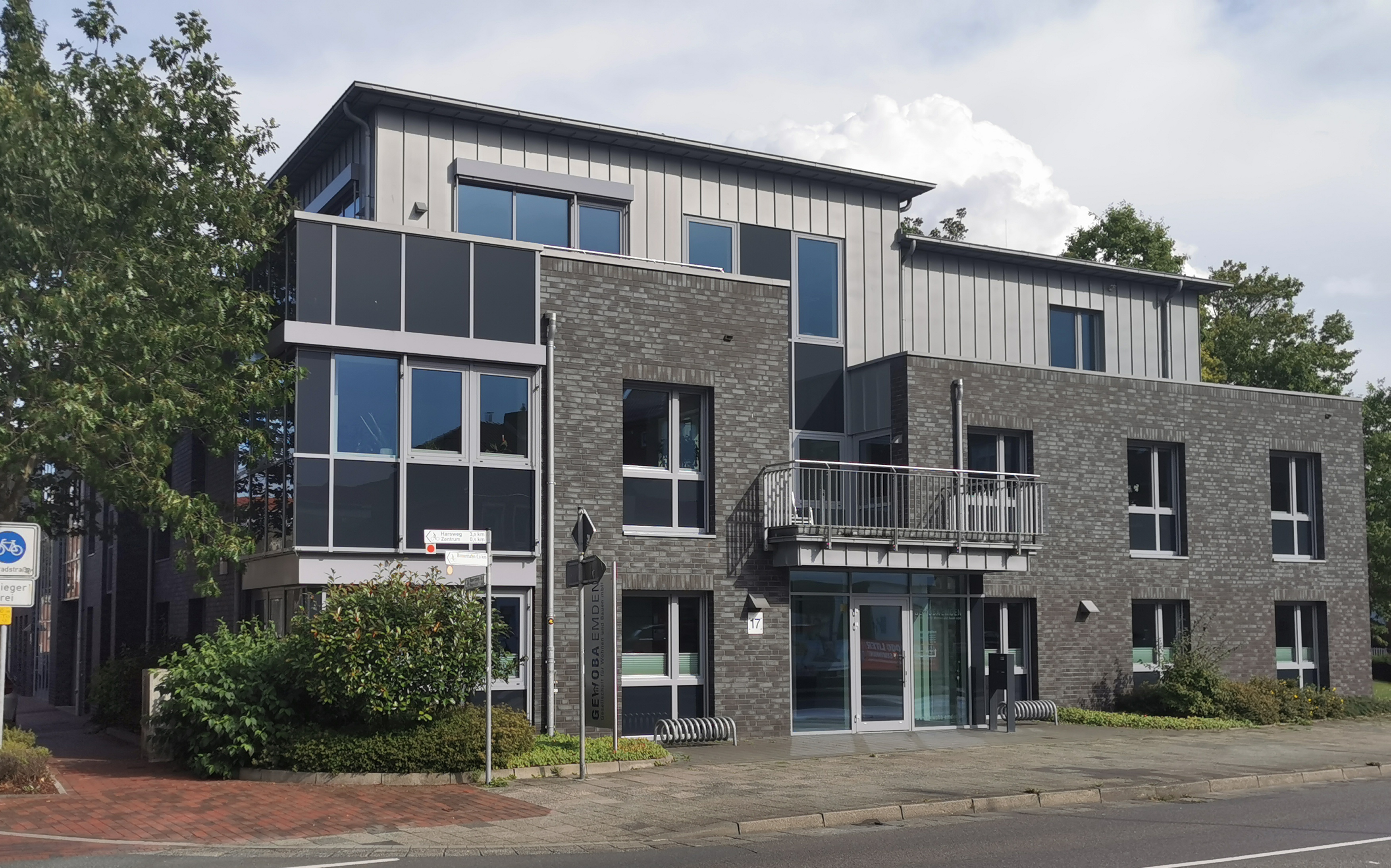 Verwaltungsgebäude GEWOBA EMDEN, An der Bonnesse 17, 26725 Emden